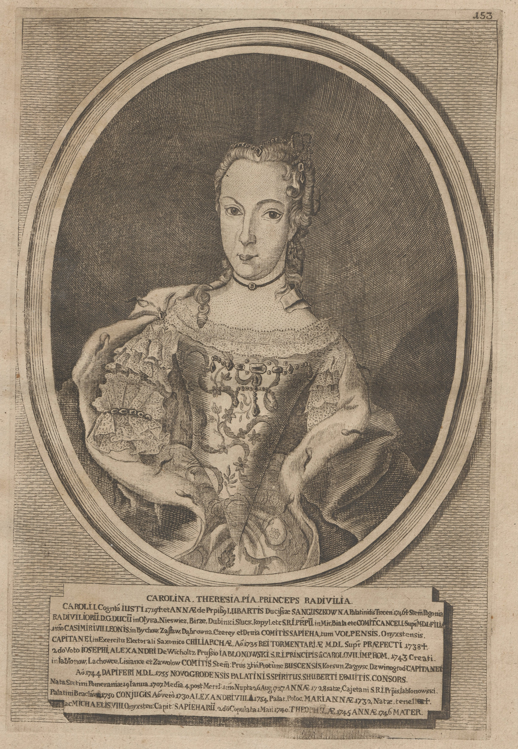 Караліна Тэрэза Пія РадзівілБеларуская (тарашкевіца): Партрэт Караліны Тэрэзы Піі Ябланоўскай (Karalina Tereza Pija Jabłanoŭskaja) з роду Радзівілаў (Radzivił)